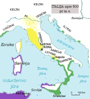 Italija senovėje - žemėlapis padarytas pagal CIA World Factbook žemėlapį ir nebeatsimenu kokį seną vokišką vadovėlį. Autorius: M.Dirgėla